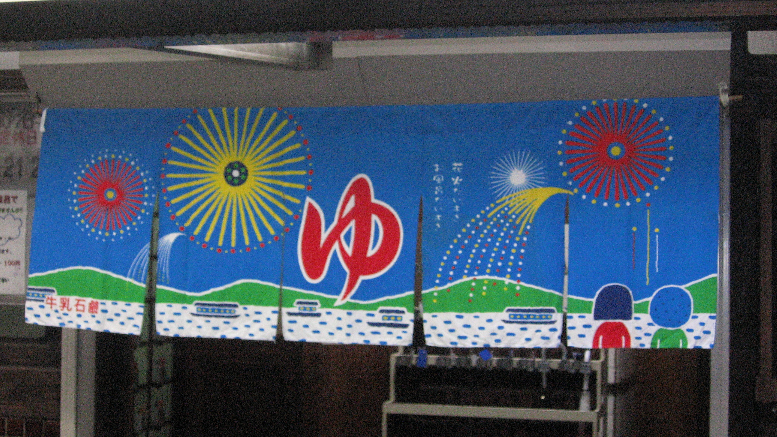 銭湯の入口でよく見られる「牛乳石鹸」ののれん。写真は2005年夏のデザイン。